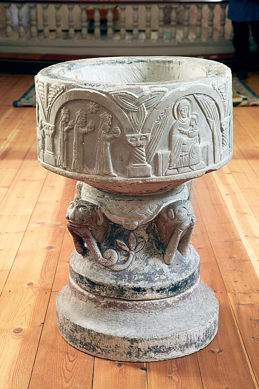 Dopfunt. Motiv: Gerums kyrka Kategori: (04) DopfuntarDopfunt.